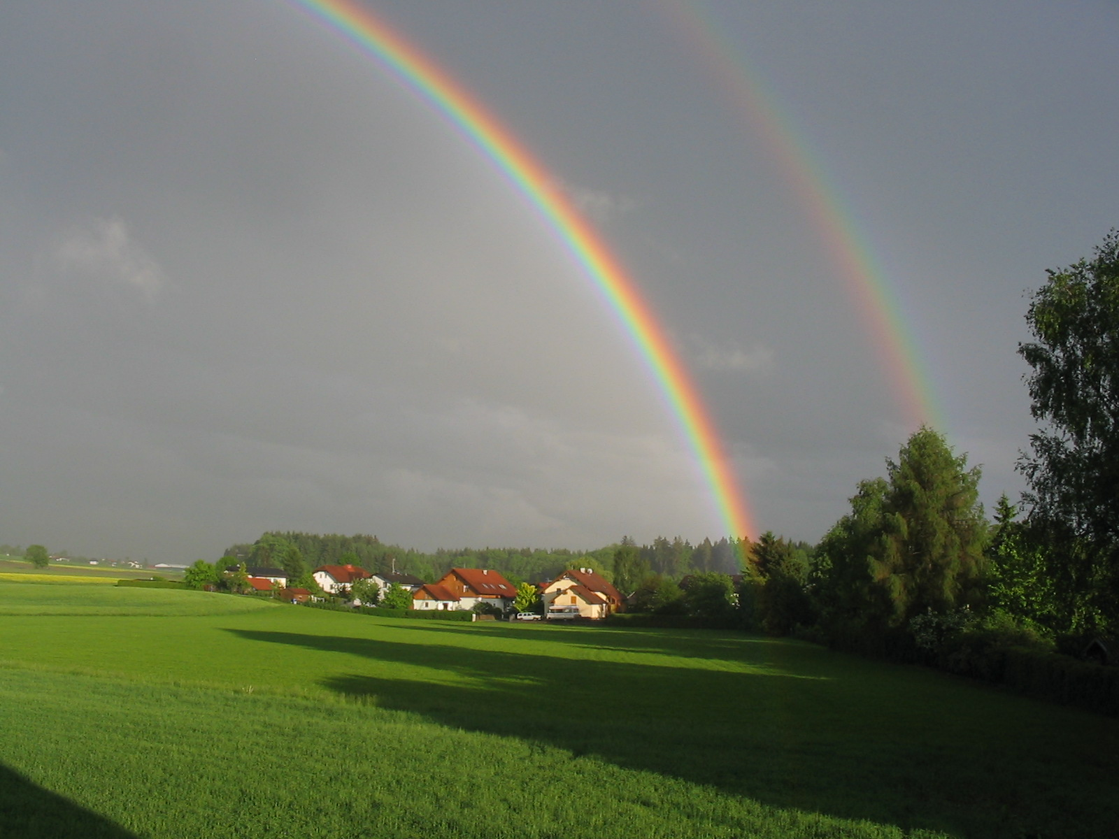 Rainbow in Maierhof